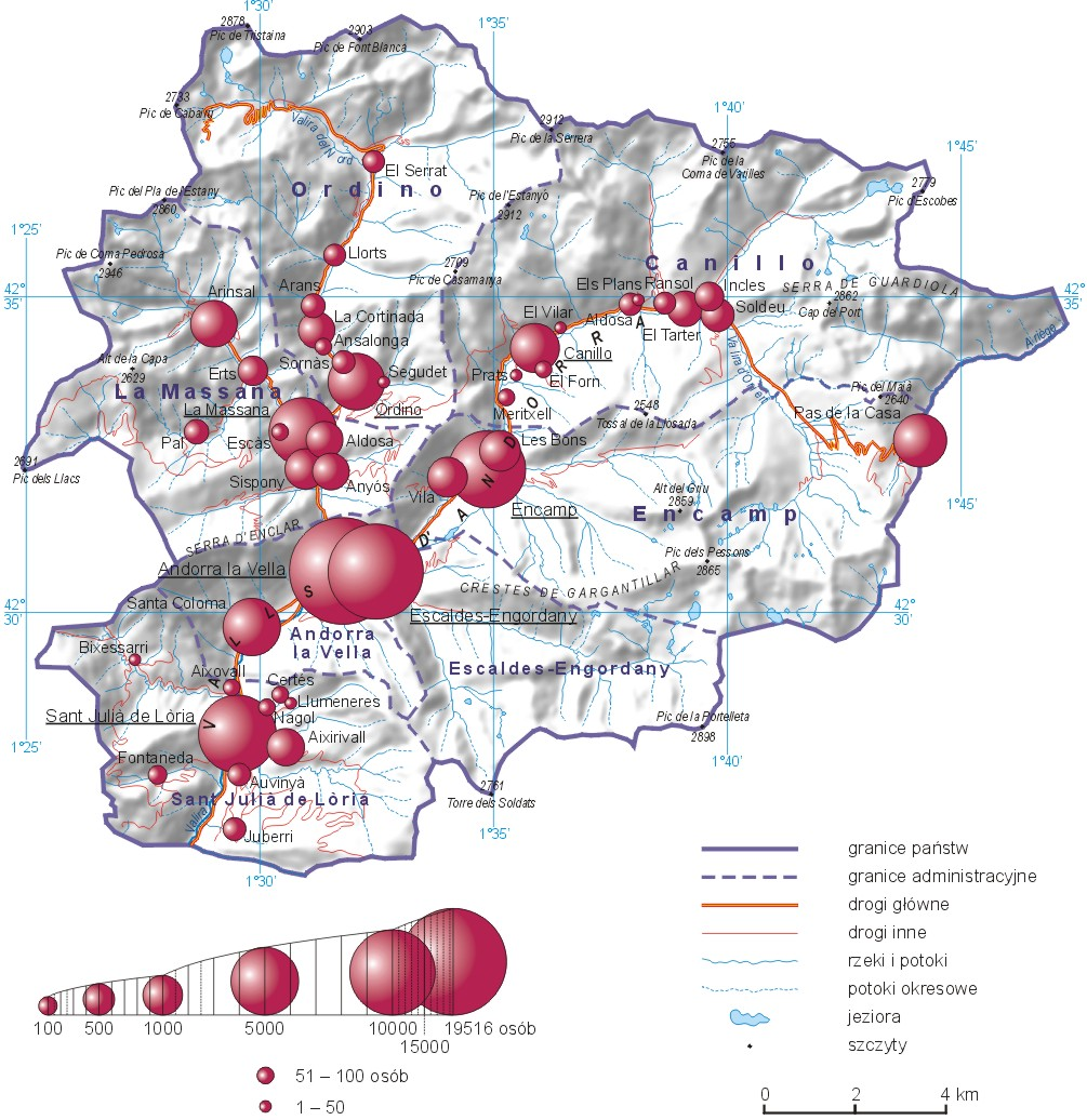 Liczba ludności w miejscowościach Andory w 2013 roku (przykład mapy, na której połączono metodę kartodiagramu oraz metody jakościowe)